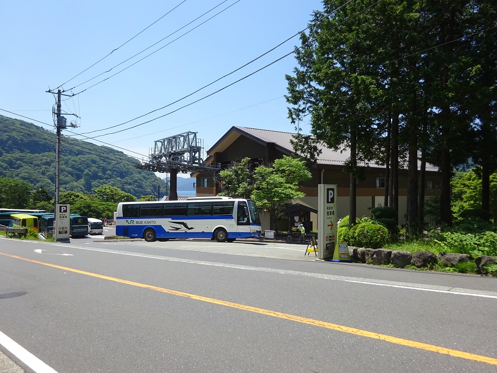 JRバス関東東京箱根線